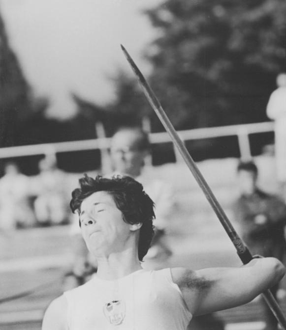 Marion Gräfe Zentralbild Kohls Tre-Pr. 31.08.1963 XIV. Deutsche Leichtathletik-Meisterschaften in Jena (30.08.- 01.09.1963) . UBz: Die überragende Leistung am 31.08.1963 waren die 58,45 m im Speerwerfen durch die 22jährige Marion Gräfe (SC DHfK Leipzig) . Sie verbessertr damit nicht nur den bisherigen Rekord von Inge Schwalbe (SC Dynamo Berlin) mit 55,64 vom 10. Juli 1960, sondern setzte sich auch an die zweite Stelle der ewigen Weltbestenliste.